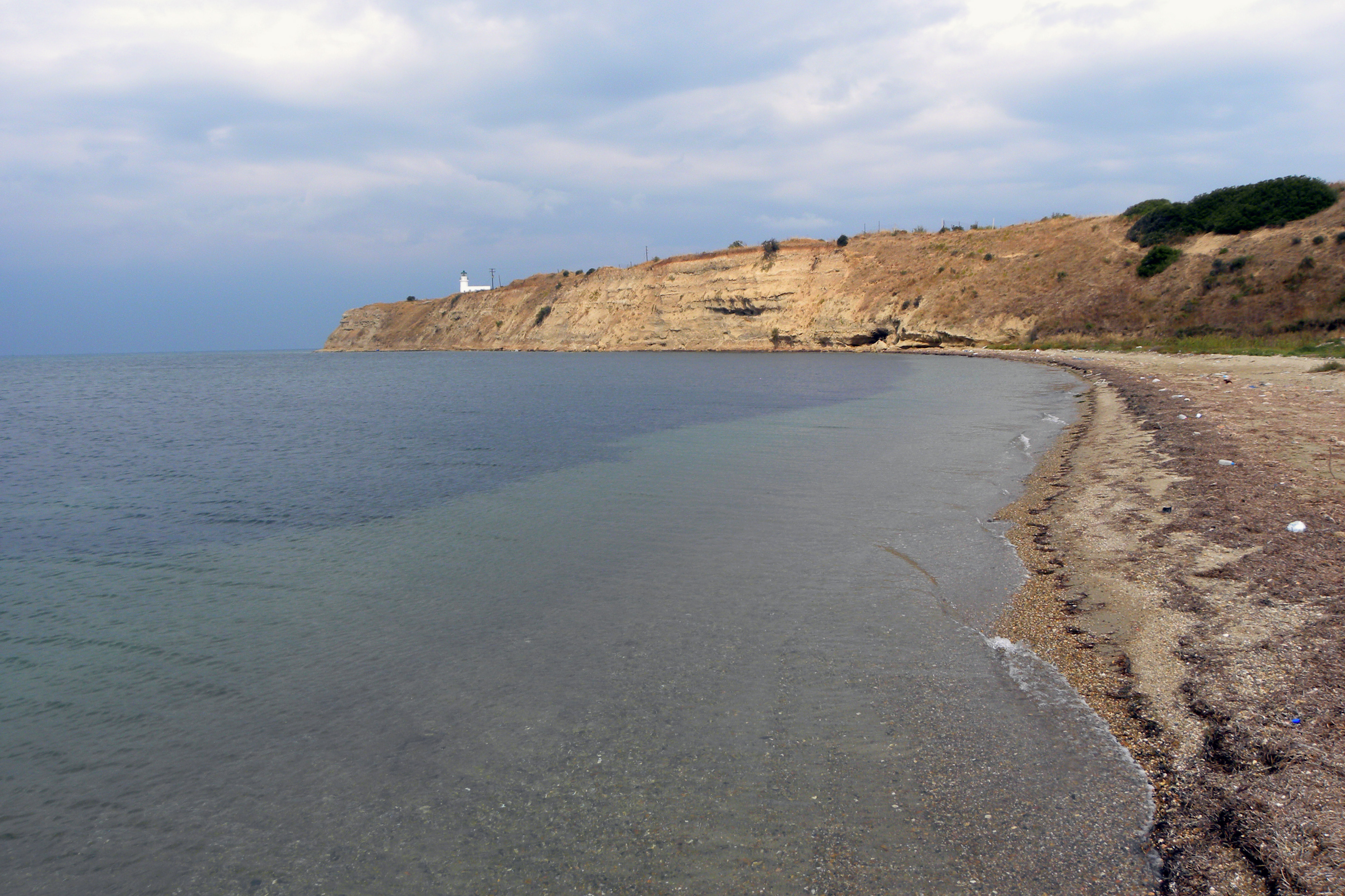 Αγγελοχώρι